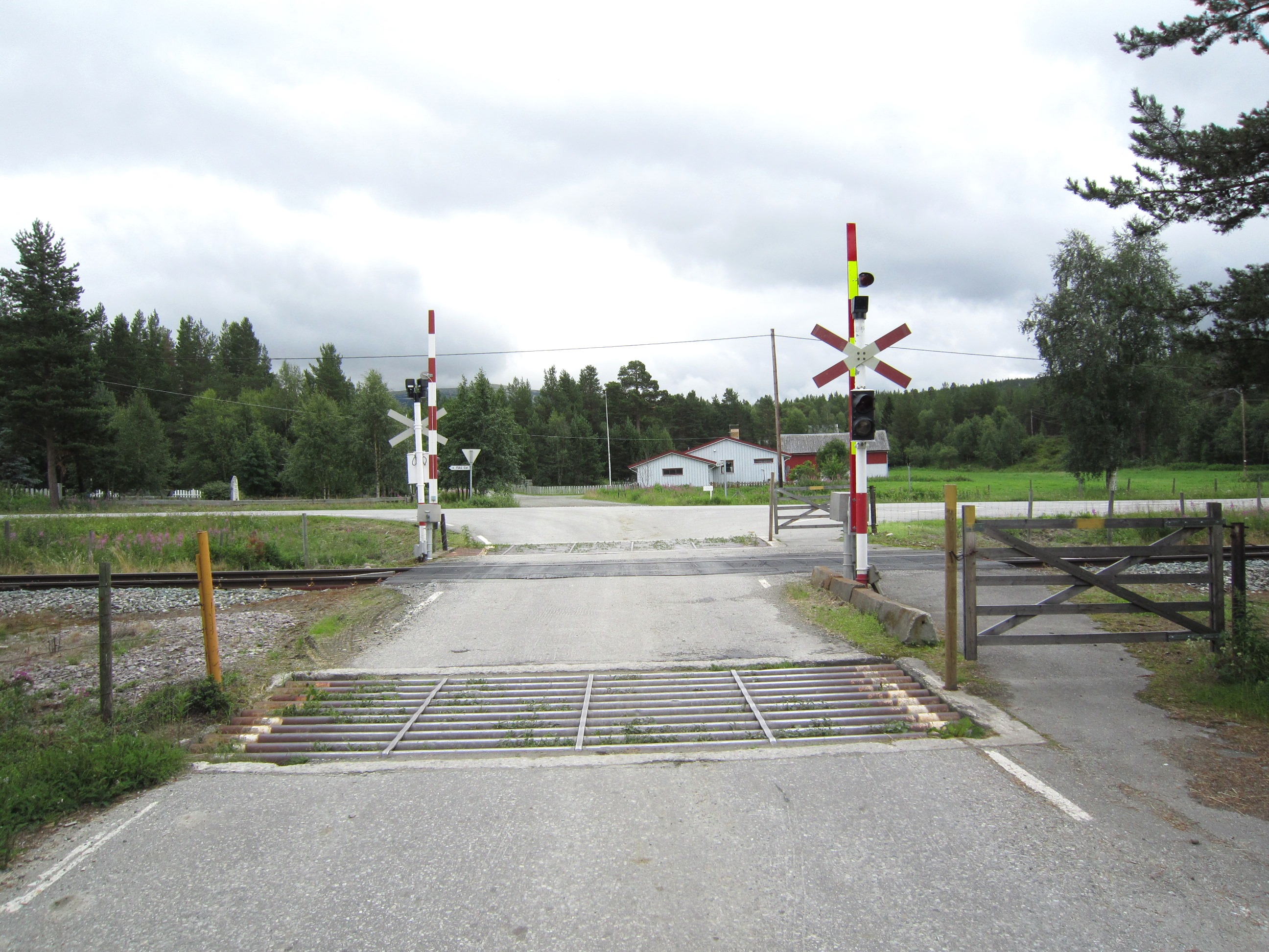 Ved Telneset tar FV720 av fra FV681 og krysser Rørosbanen.